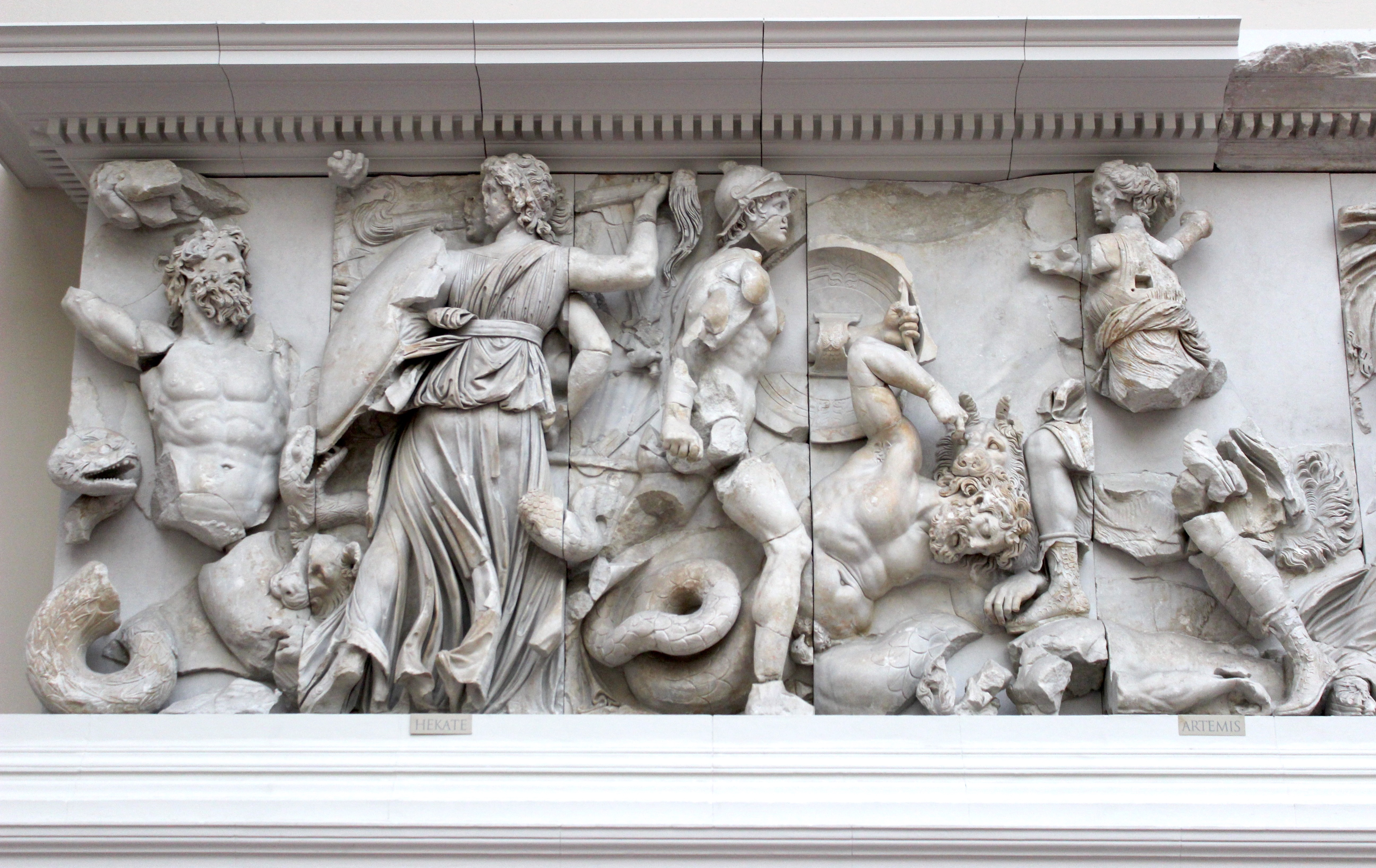 Ártemis lucha con los gigantes. Altar de Pérgamo.